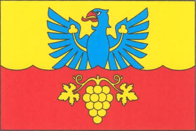 Krhovice vlajka